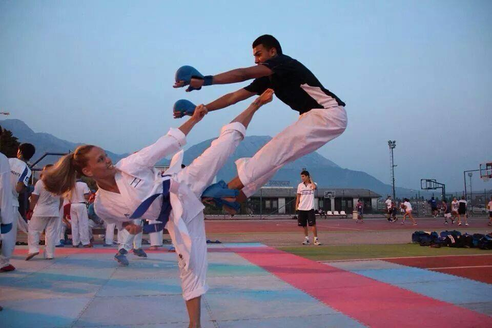 מחנה אימונים במונטנגרו 2013